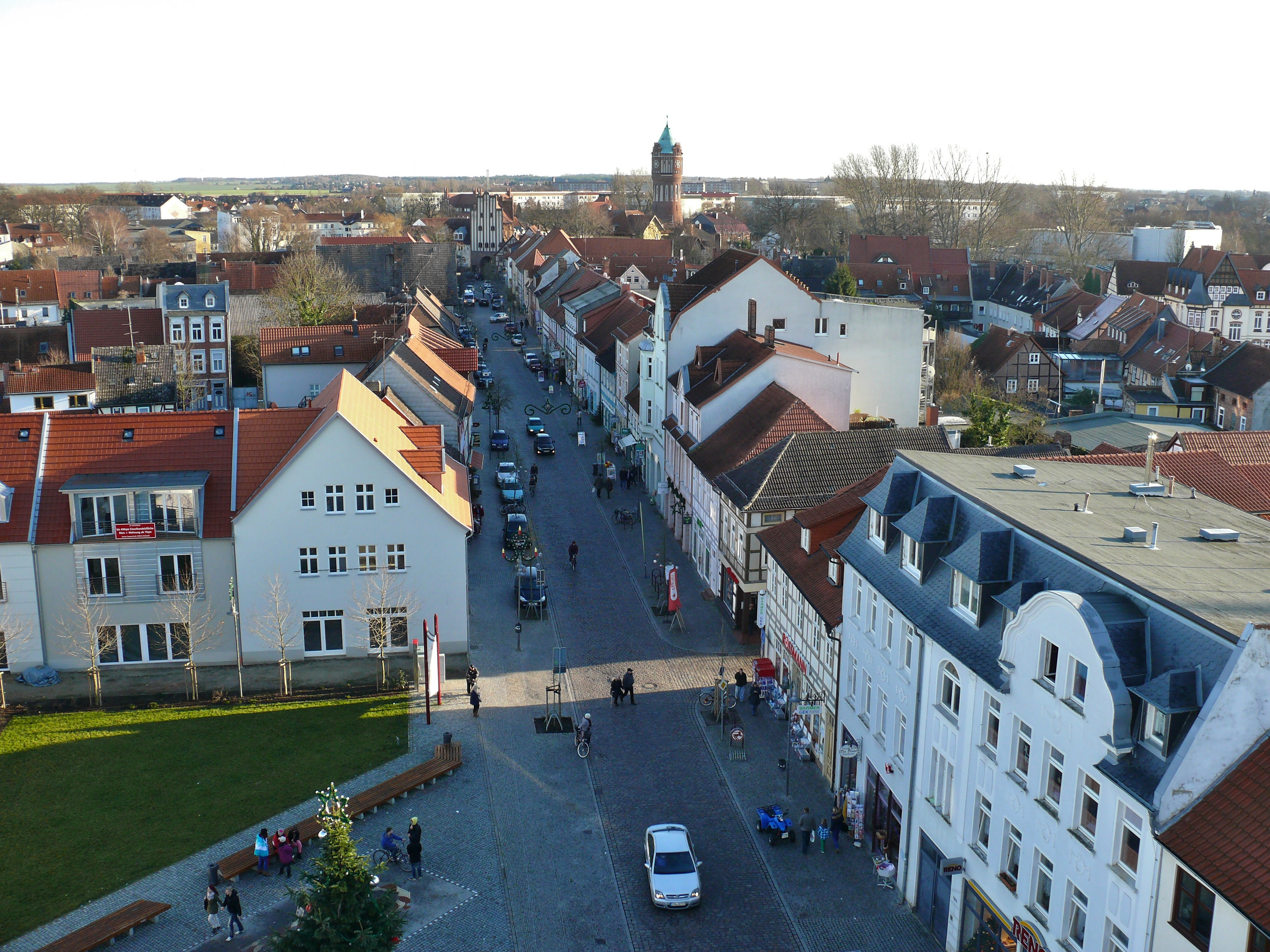 Blick vom Rathausturm der Hansestadt Salzwedel Richtung Osten, entlang der Neuperver Straße. Im Hintergrund das Neuperver Tor, sowie rechts davon der Wasserturm.